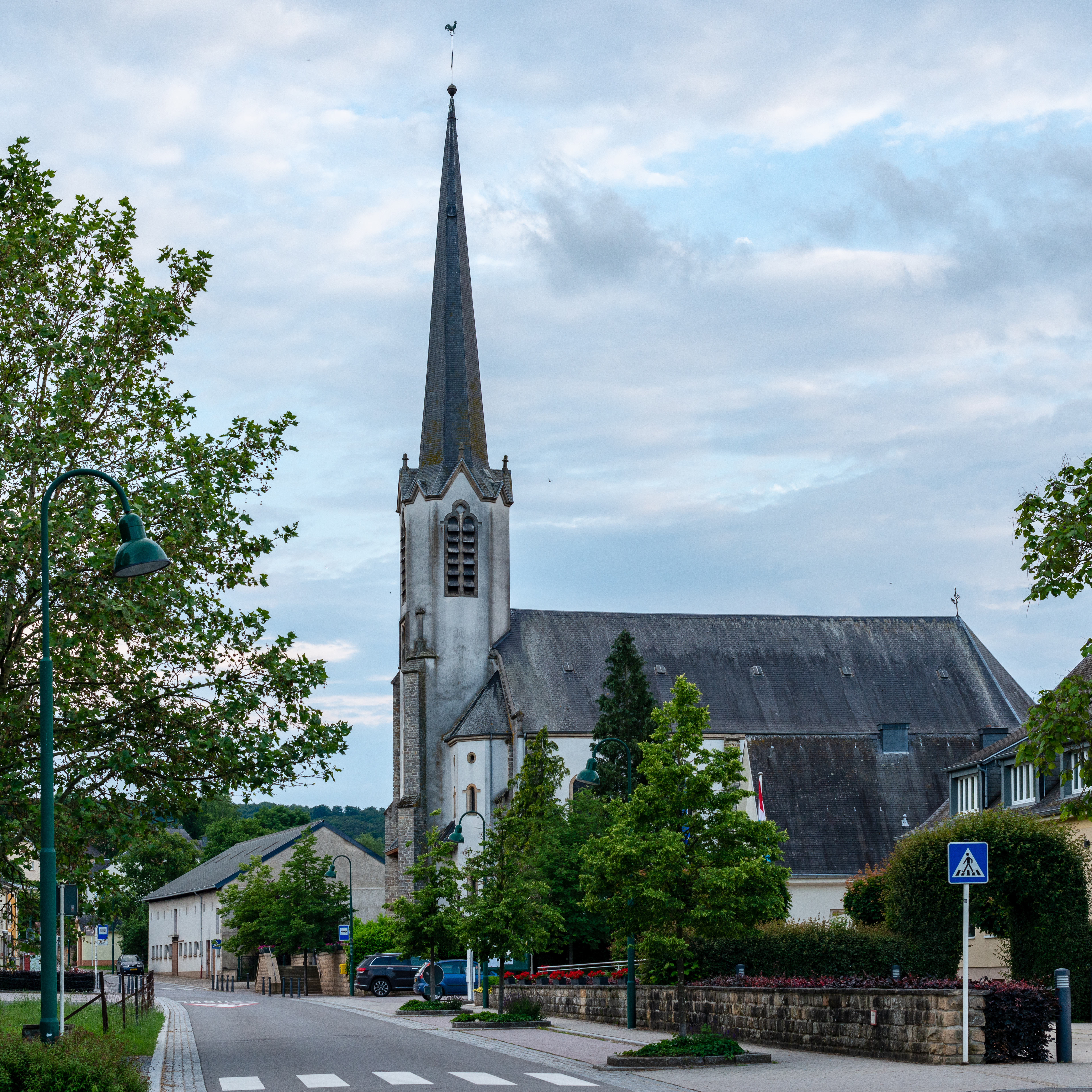 D'Rue Principale (CR306) zu Noumer.